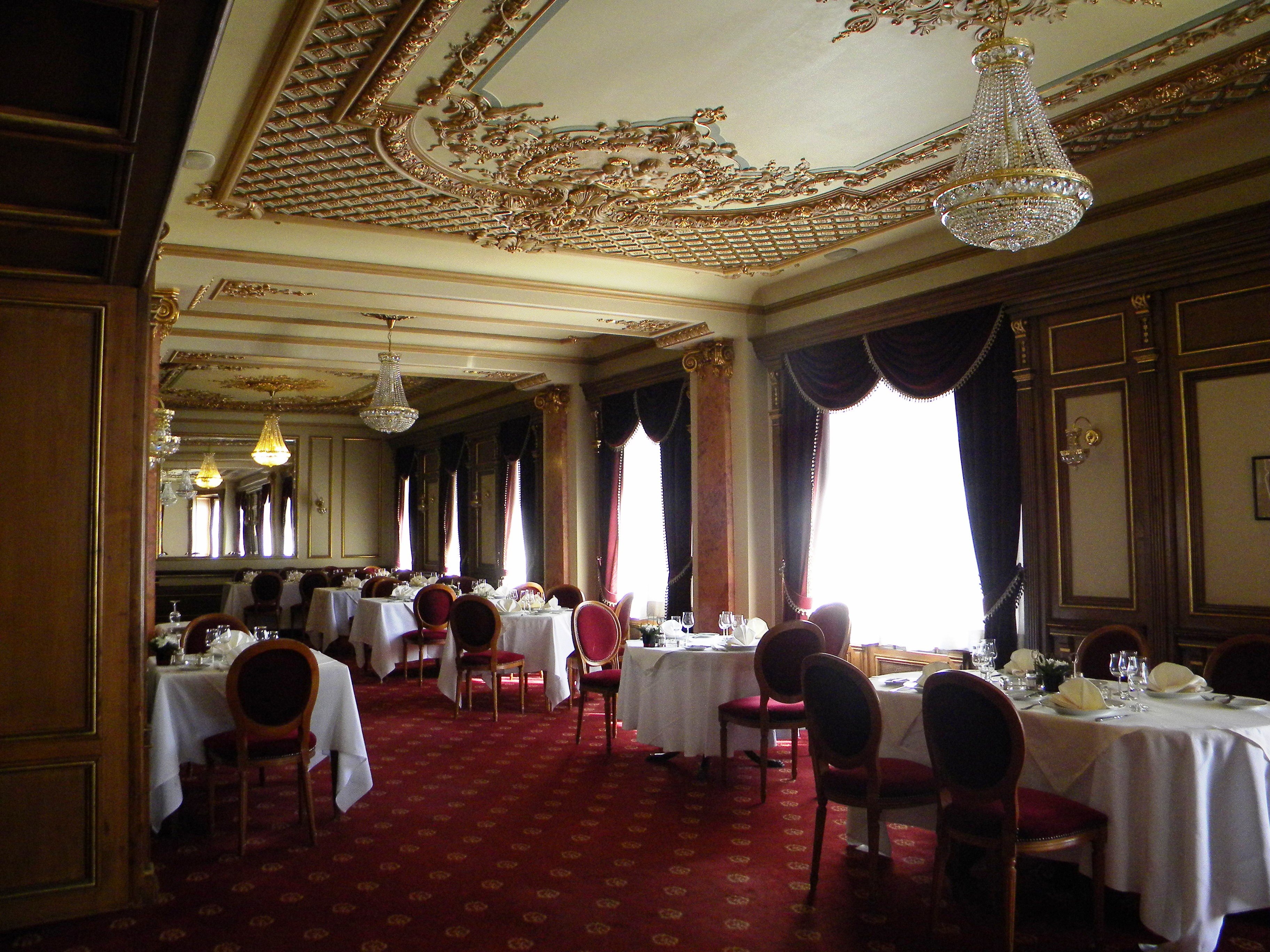 Bucuresti, Romania, CAPSA (interior 6)